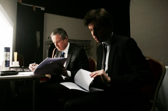 Damien Lempereur directeur stratégique de Nicolas Dupont-Aignan pour les présidentielles en 2012